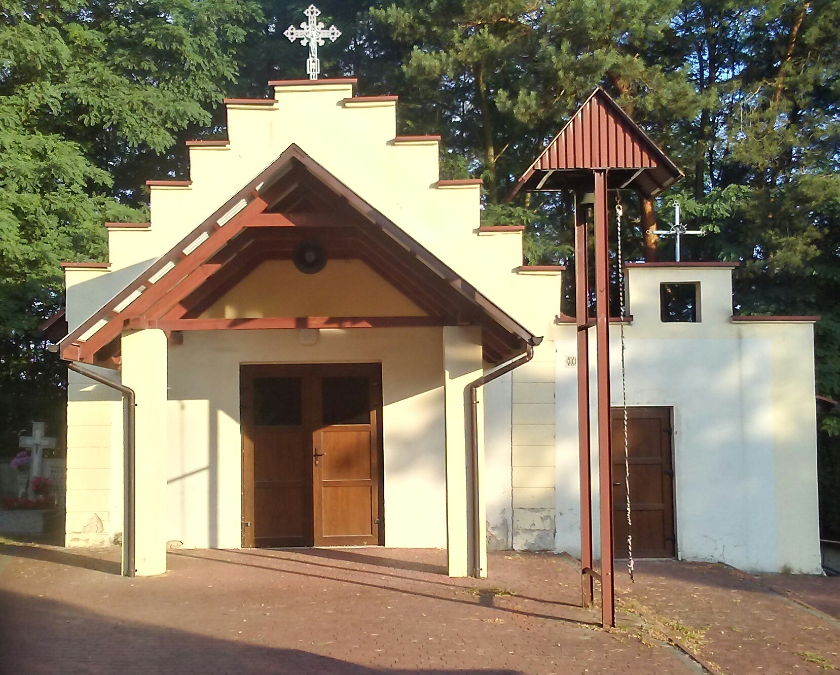 Bialobrzegi (dzielnica Tomaszowa Mazowieckiego, w województwie łódzkim), kaplica cmentarna. PL. EU. CC0